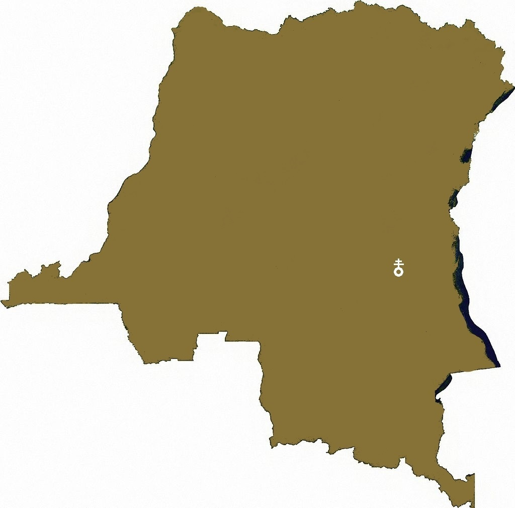 kaart congo